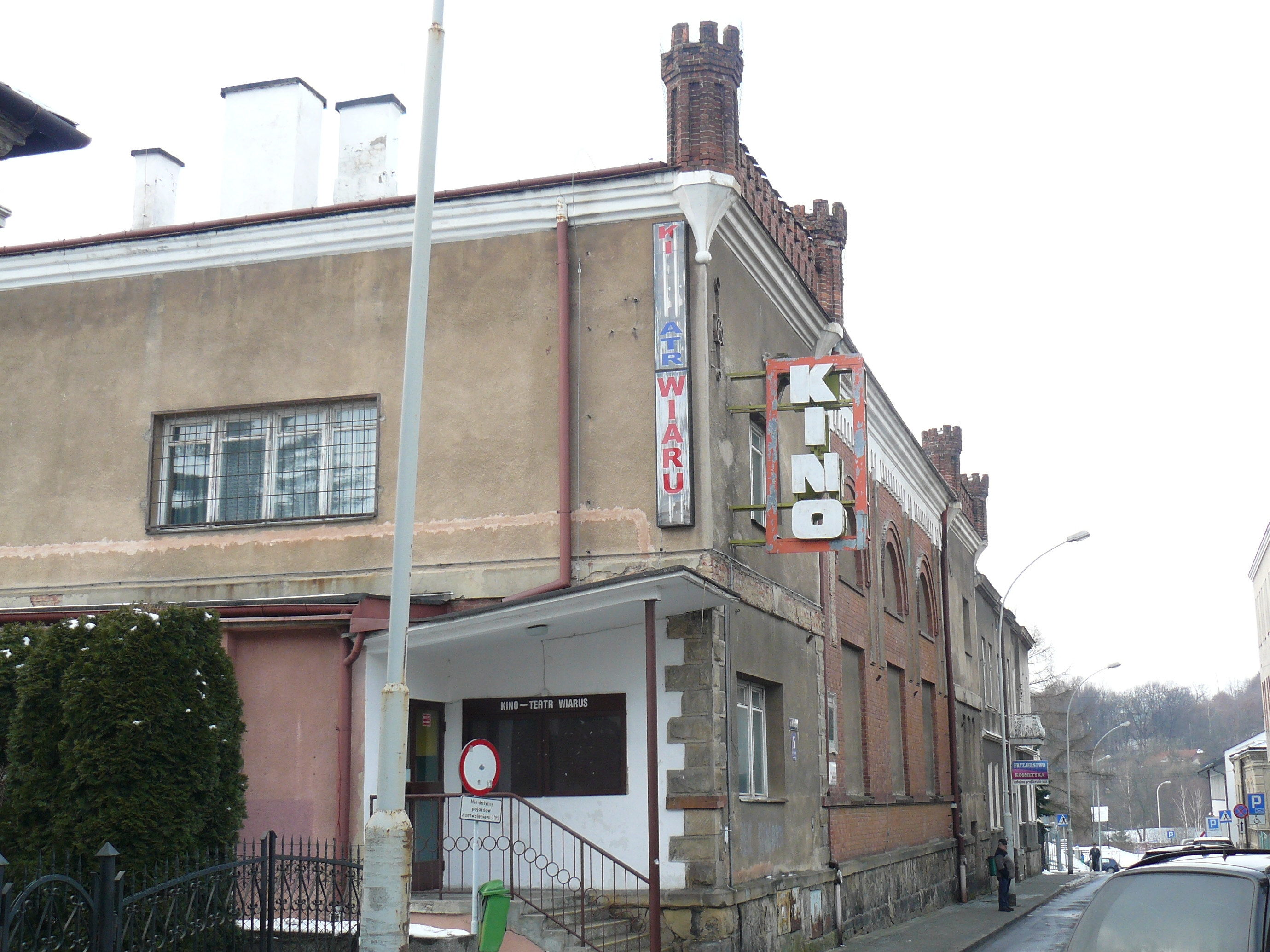 Budynek Kina „Wiarus” w Gorlicach, budynek wybudowany w 1904 r.był siedzibą Towarzystwa Gimnastycznego „Sokół”.